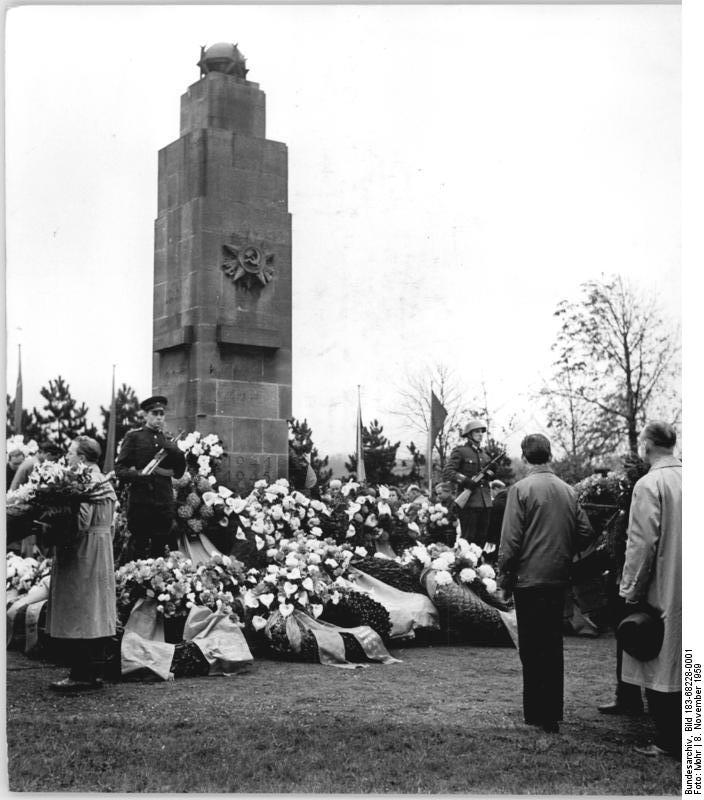 Leipzig, Ostfriedhof, Sowjetisches Ehrenmal Zentralbild Mohr So-Ku 8.11.1959 Kranzniederlegung am Sowjetischen Denkmal auf dem Ostfriedhof in Leipzig Viele Delegationen der Parteien, Organisationen, Institute und Betriebe legten anlässlich des 42. Jahrestages der Grossen Sozialistischen Oktoberrevolution am sowjetischen Ehrenmal auf dem Ostfriedhof in Leipzig Kränze nieder.